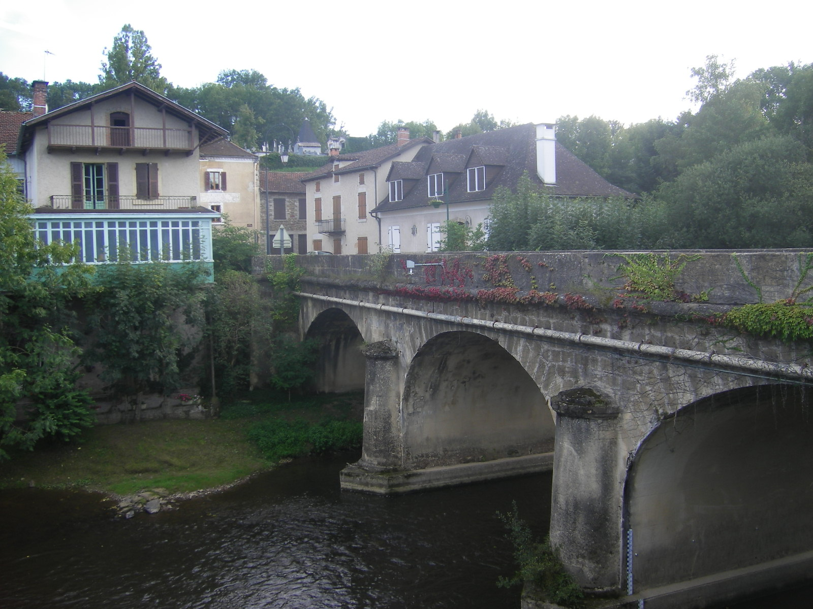 Bagnac-sur-Célé